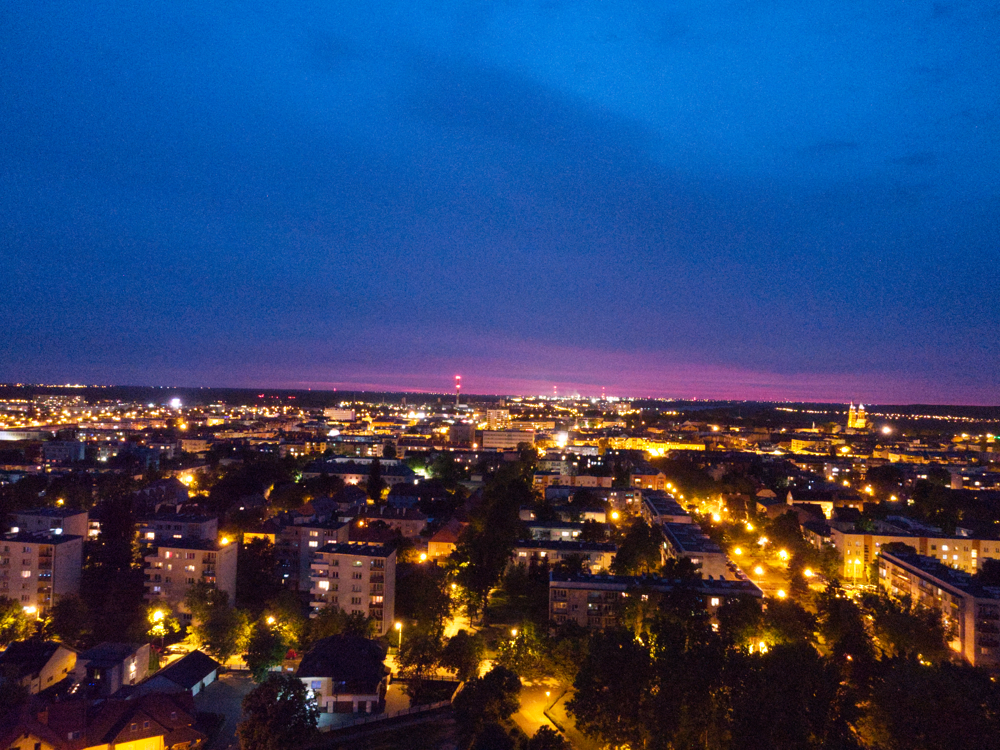 Śródmieście (2020 r.)